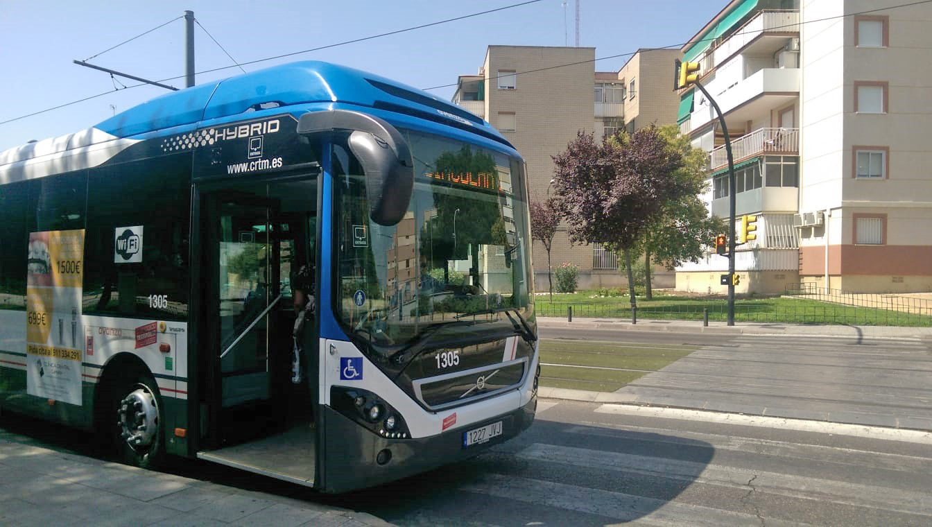 nuevos circulares de Parla son de color azul y blanco sustituyendo a los antiguos amarillos